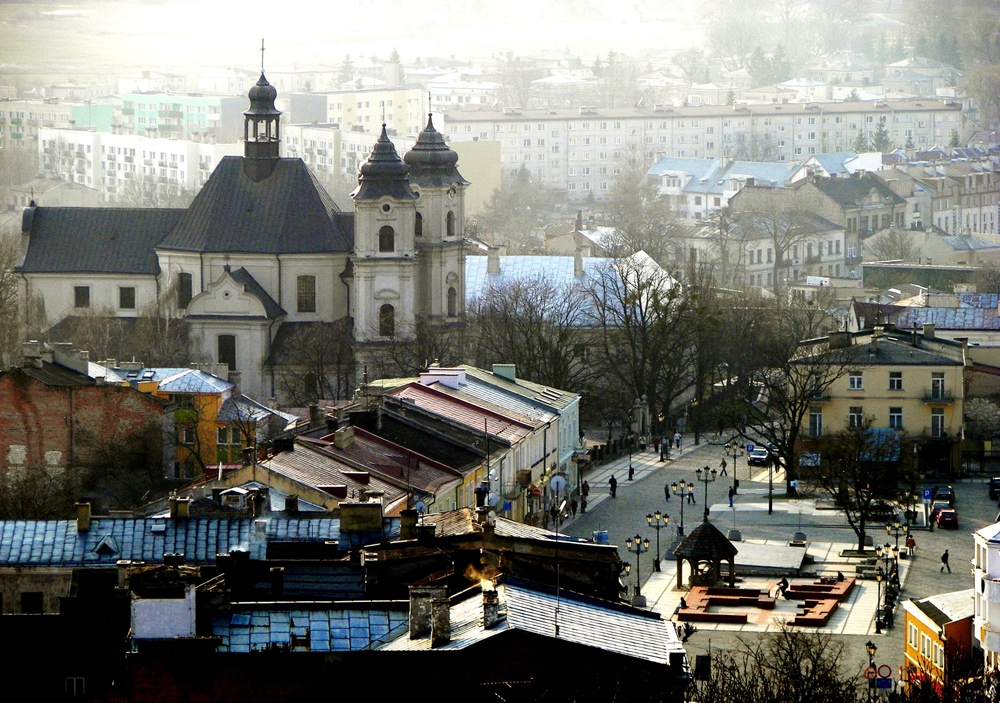 Chełm